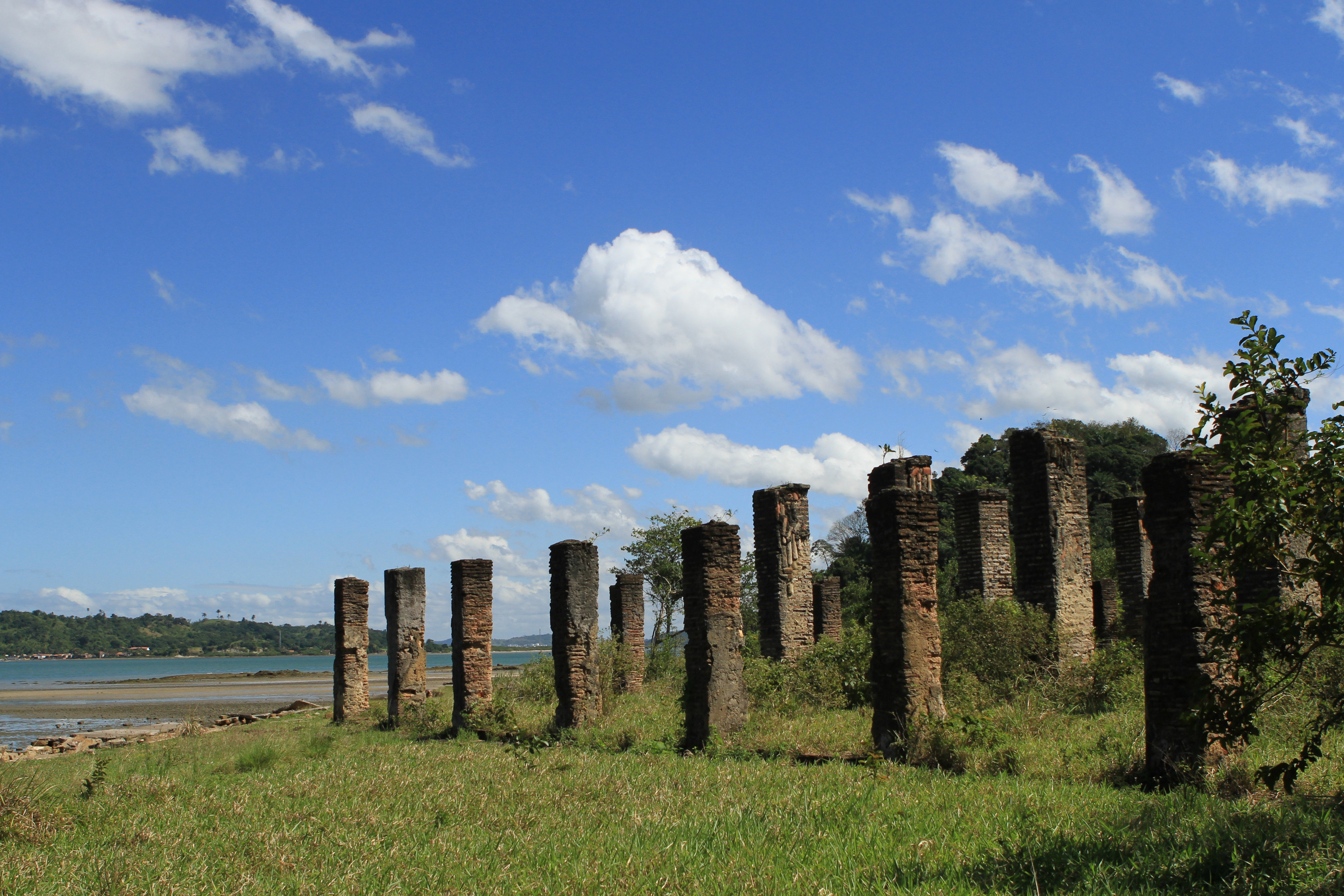 Caboto. Foto- Tatiana Azeviche (92)